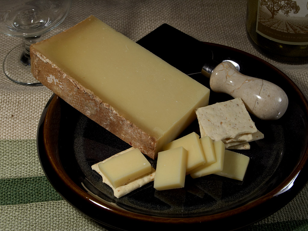 Beaufort d'Alpage Cheese